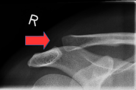 Röntgenaufnahme einer ACG-Läsion Tossy II rechts